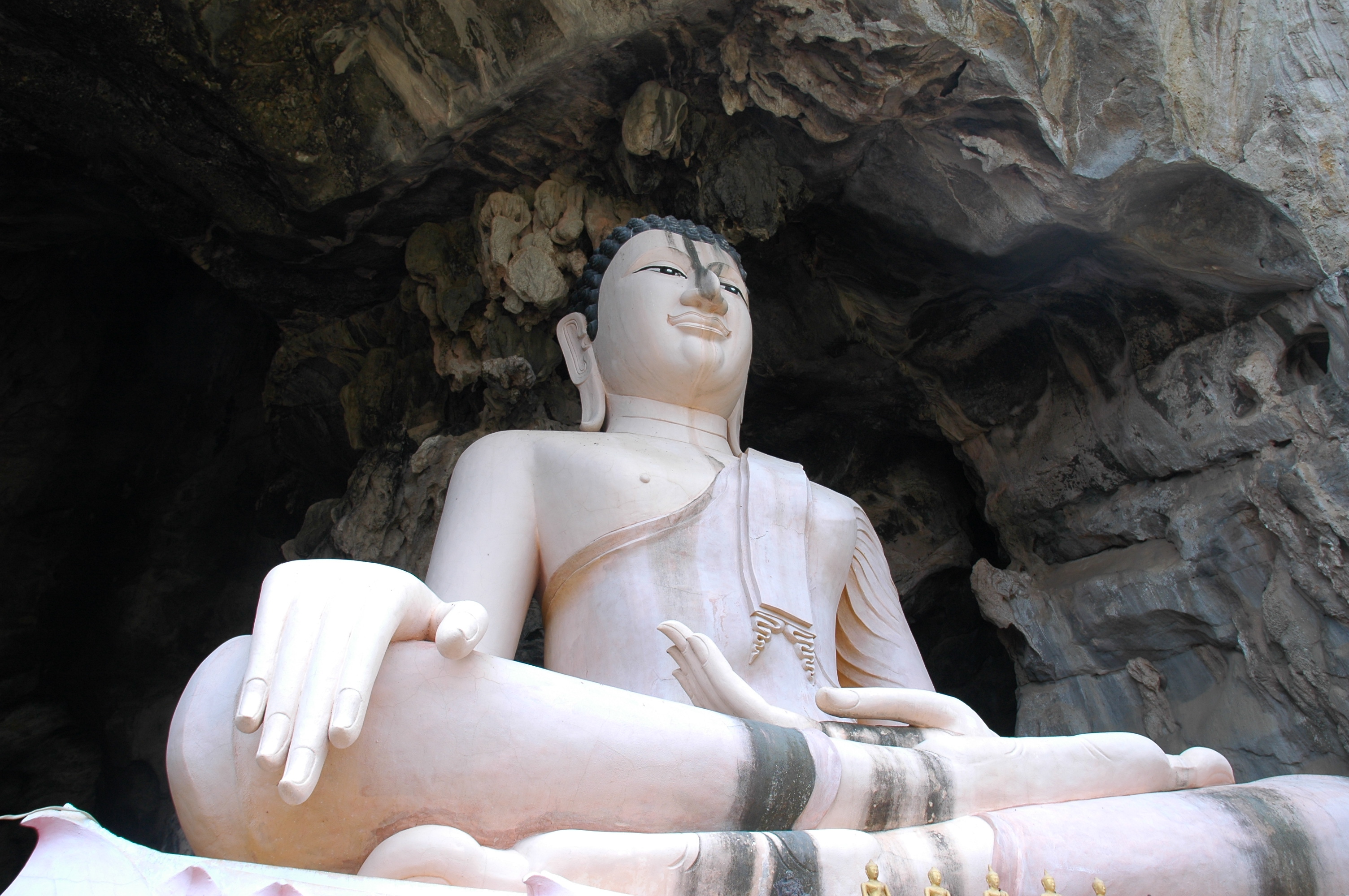 Buddha-Image, Tham Erawan, Nongbua Lamphu, Thailand